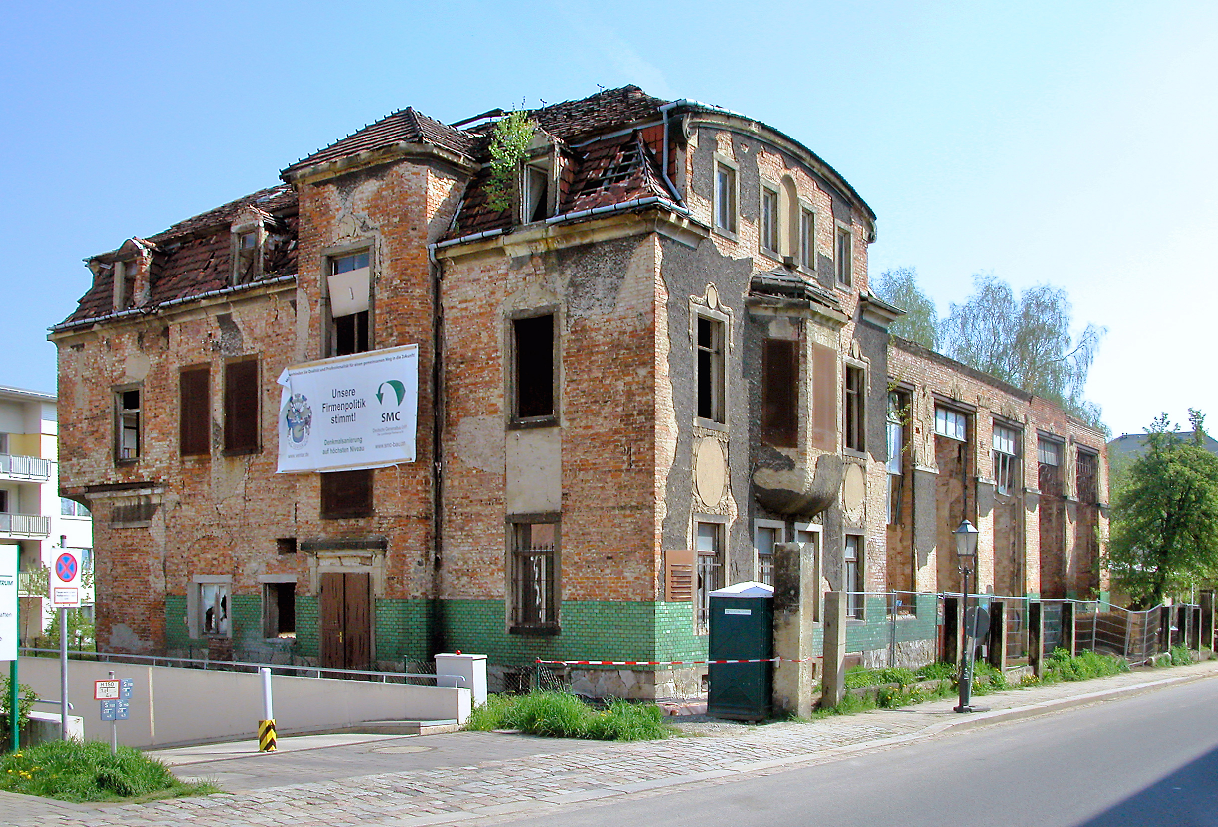 27.04.2008 01159 Dresden-Löbtau: Ruine des 1899 für die Kunstgießerei Pirner und Franz errichteten Gebäudes, Mohorner Str. 12 (GMP: 51.035175,13.700198). Von hier stammen u.a. die Skulpturen der "Vier Jahreszeiten" an der Treppe zur Brühlschen Terrasse. Sicht von Süden. [DSCN32399.TIF]20080427055DR.JPG(c)Blobelt